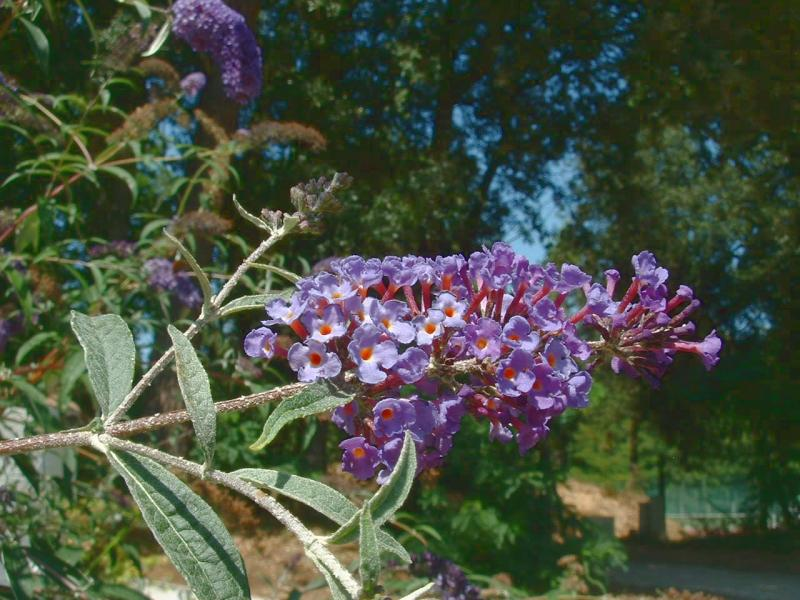 Buddleia (arbre aux papillons), Talmont-Saint-Hilaire, juillet 2004